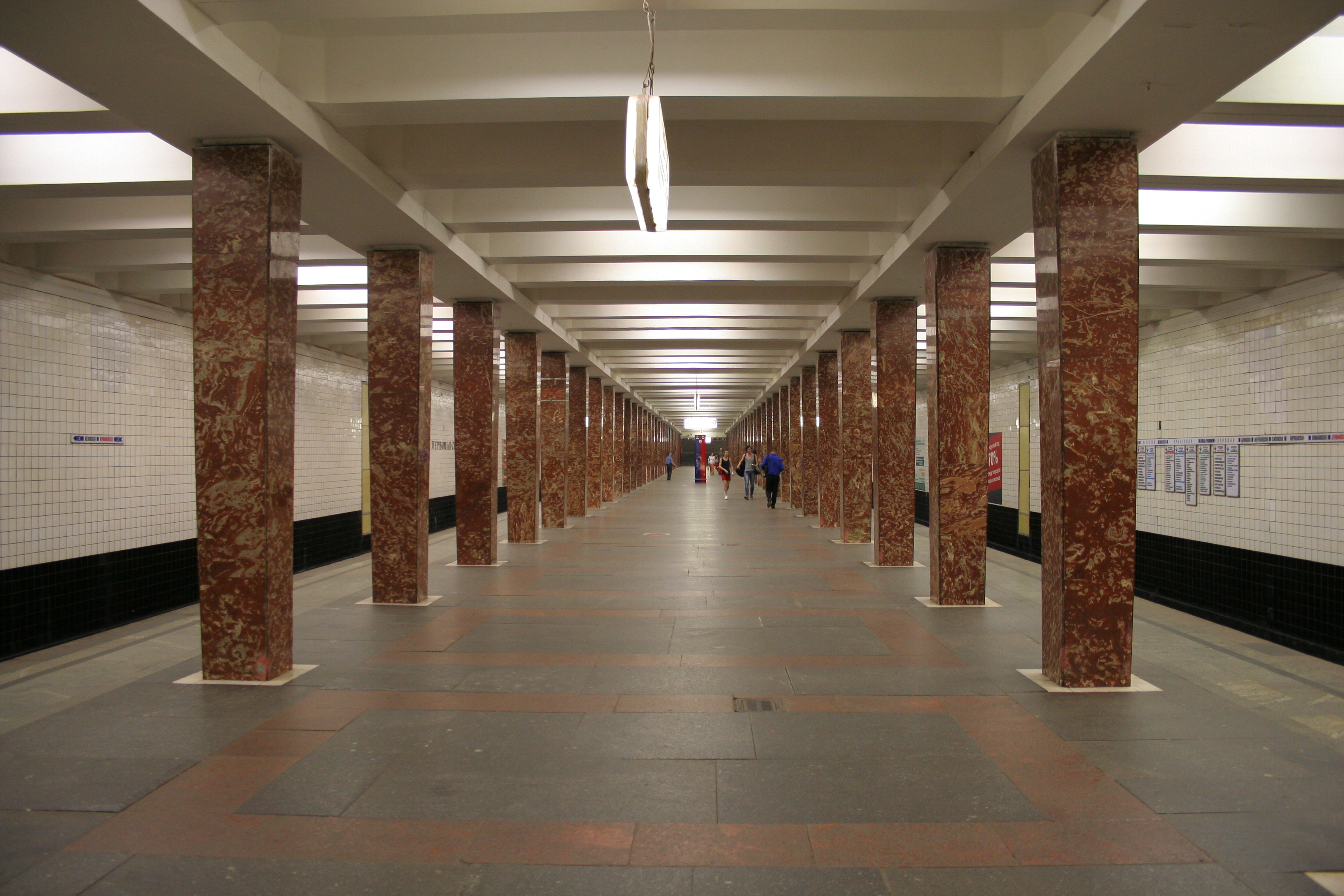 U-Bahnhof Perwomaiskaja der Metro Moskau.